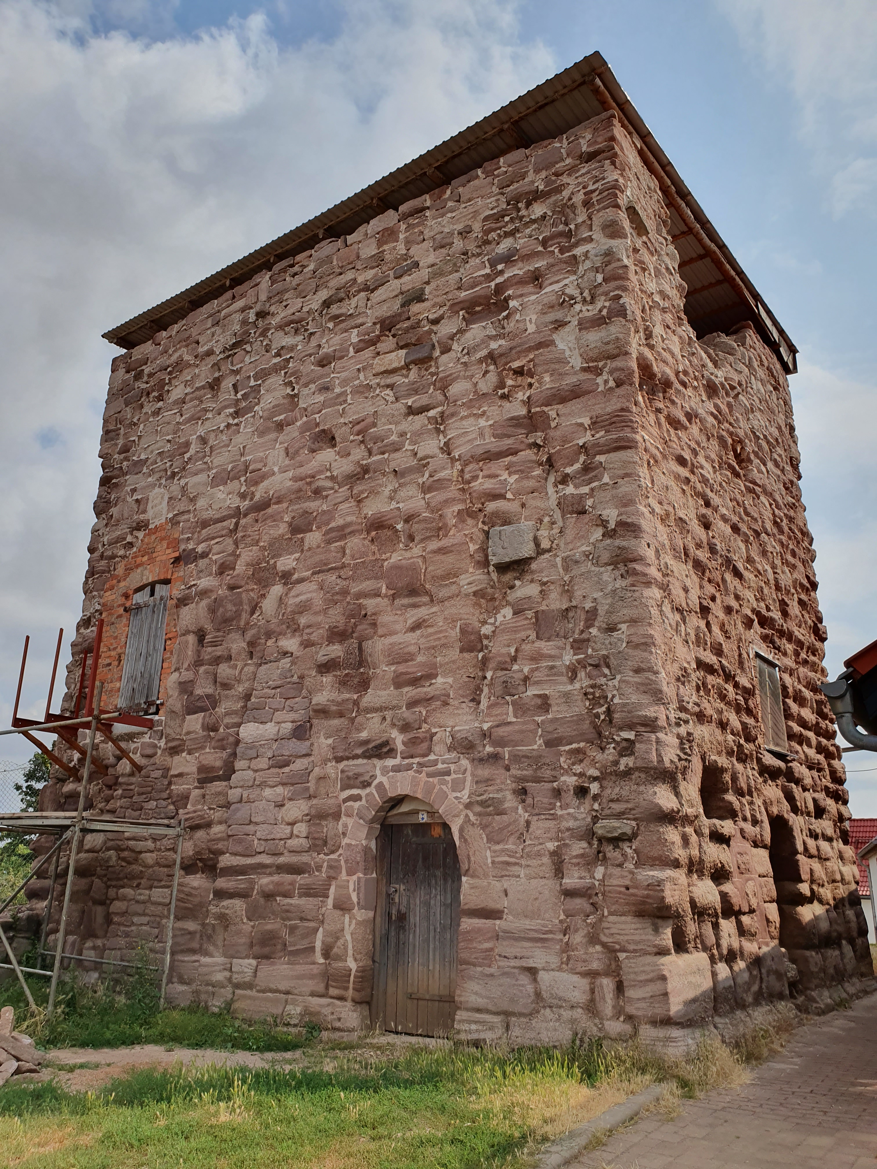 Wehrkirche Ichstedt, Thüringen